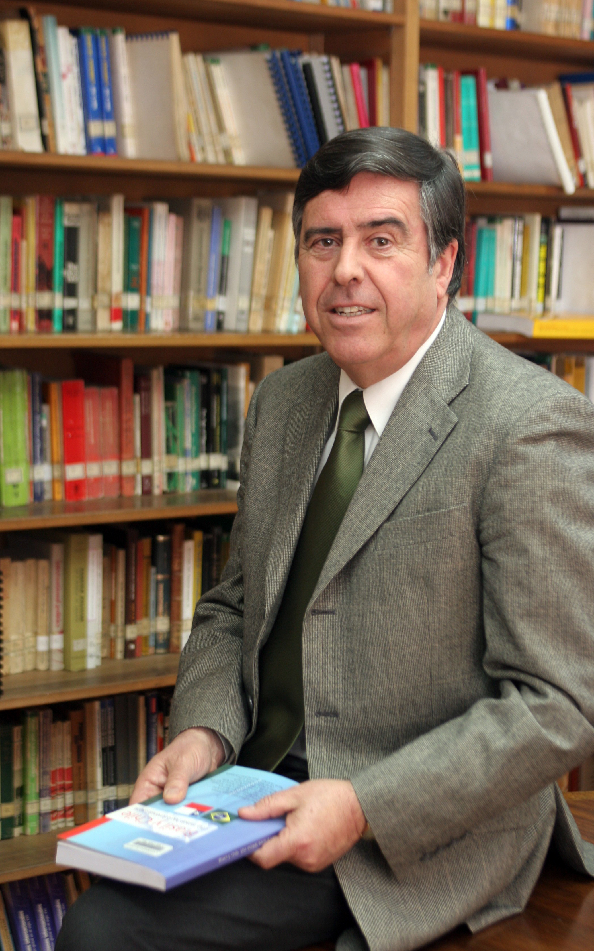 José Morandé Lavín es académico de la Universidad de Chile y Director del Instituto de Estudios Internacionales de esa Universidad.